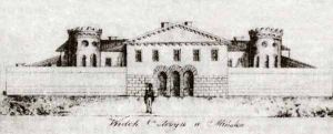 Piszczalauski_castle_(Miensk,_Bielarus), Пішчалаўскі замак у Менску